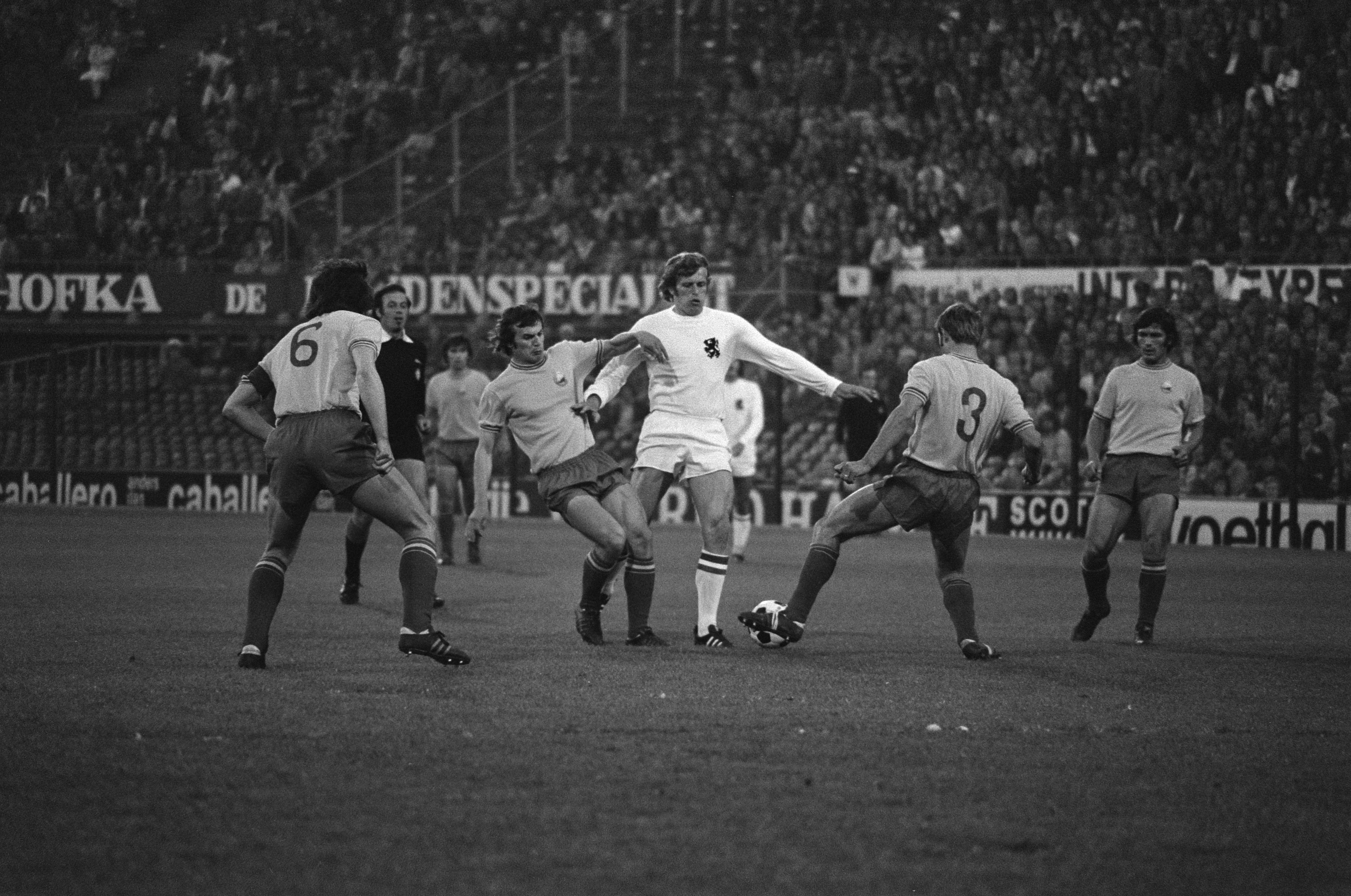 Collectie / Archief : Fotocollectie Anefo Reportage / Serie : [ onbekend ] Beschrijving : Oefenwedstrijd WK voetbal, Nederland tegen Roemenië 0-0; Piet Keizer in actie Datum : 5 juni 1974 Locatie : Rotterdam Trefwoorden : sport, voetbal Persoonsnaam : Keizer, Piet Fotograaf : Verhoeff, Bert / Anefo Auteursrechthebbende : Nationaal Archief Materiaalsoort : Negatief (zwart/wit) Nummer archiefinventaris : bekijk toegang 2.24.01.05 Bestanddeelnummer : 927-2330